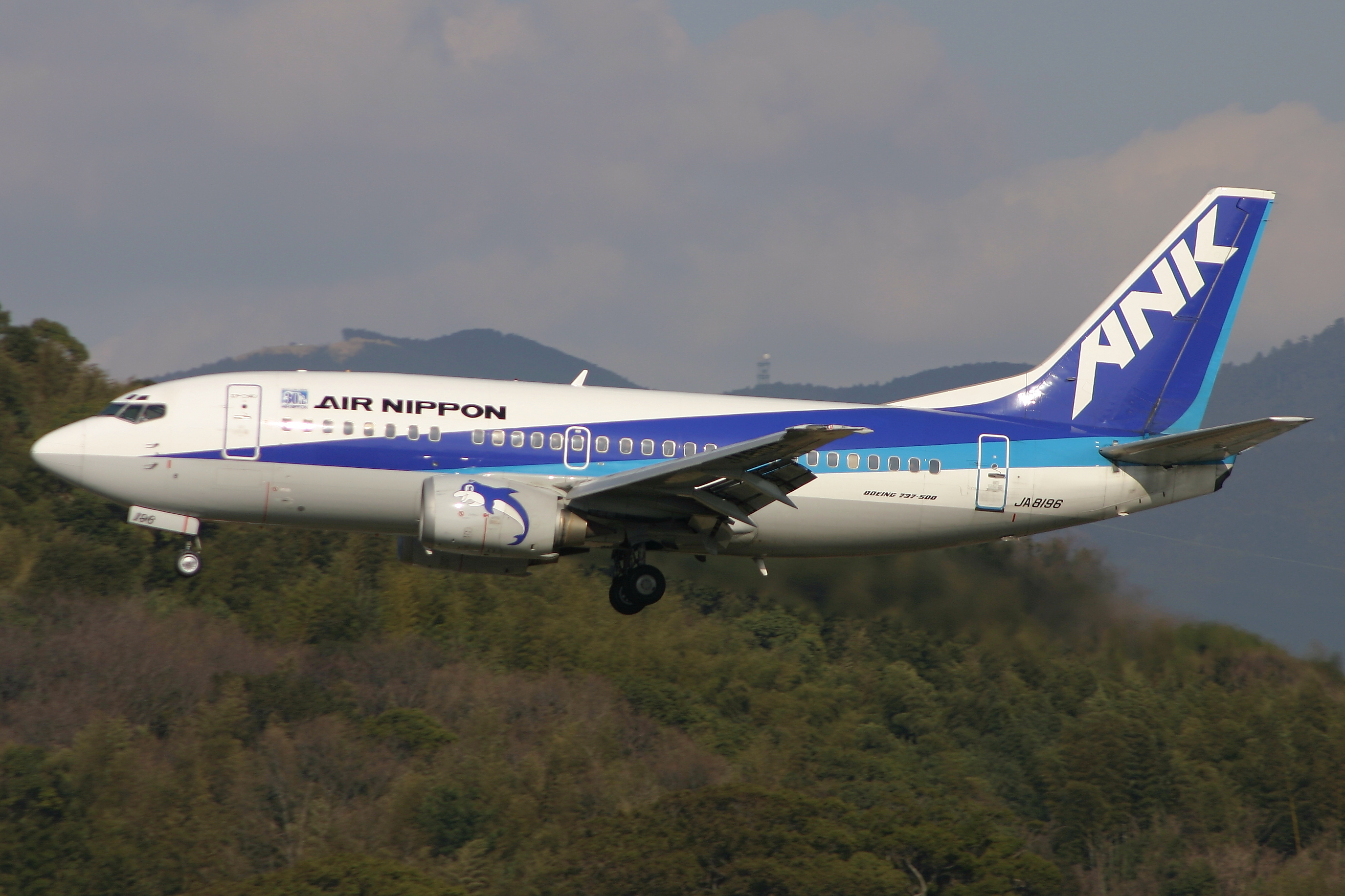 エアーニッポン ボーイング 737-500 福岡空港